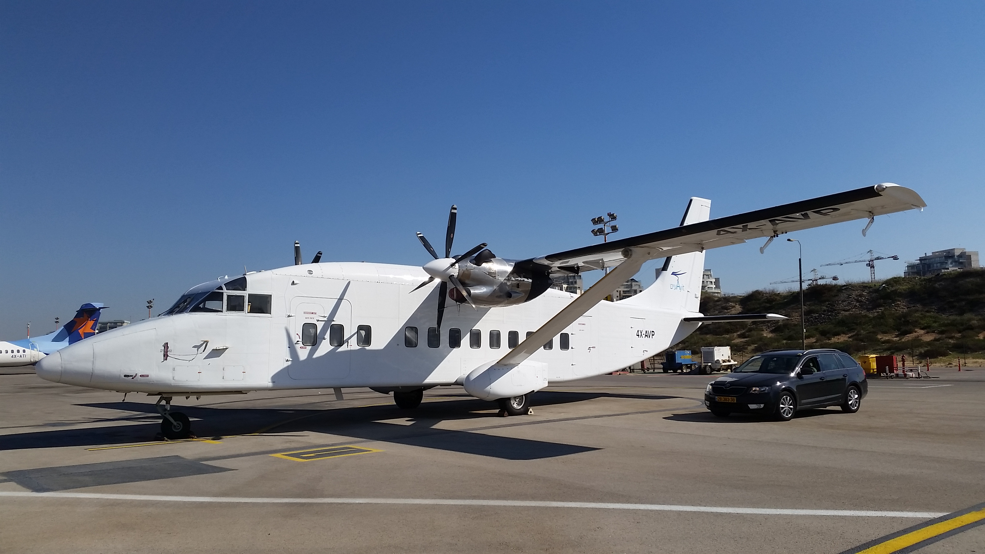 מטוס השורטס 360 של חברת עיט